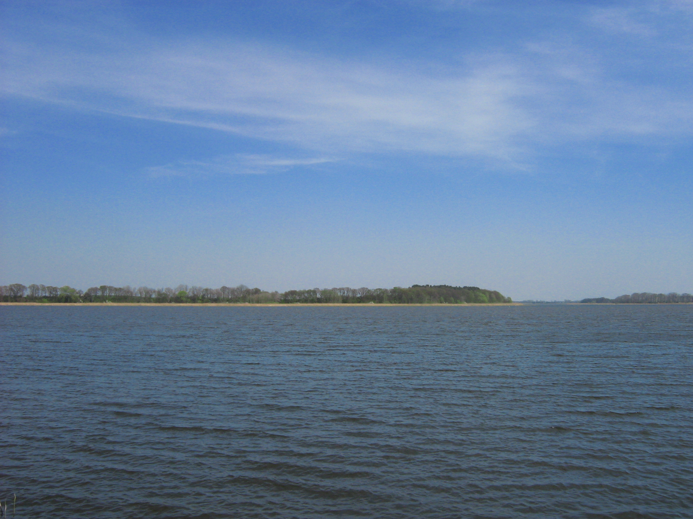 Wyspa Chrząszczewska widziana z Sierosławia